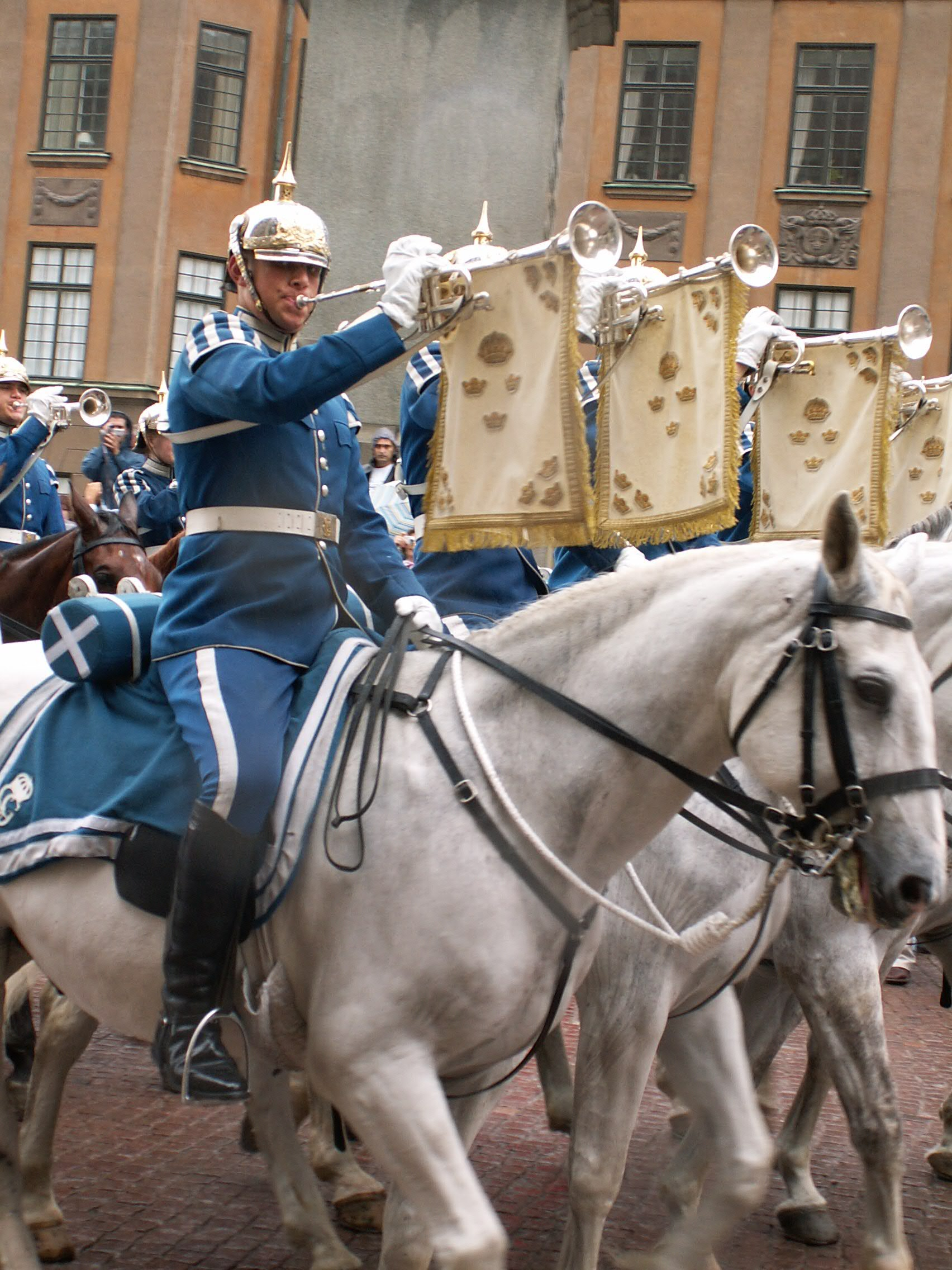 Del i beridna högvakten vid Stockholms slott. Augusti 2005